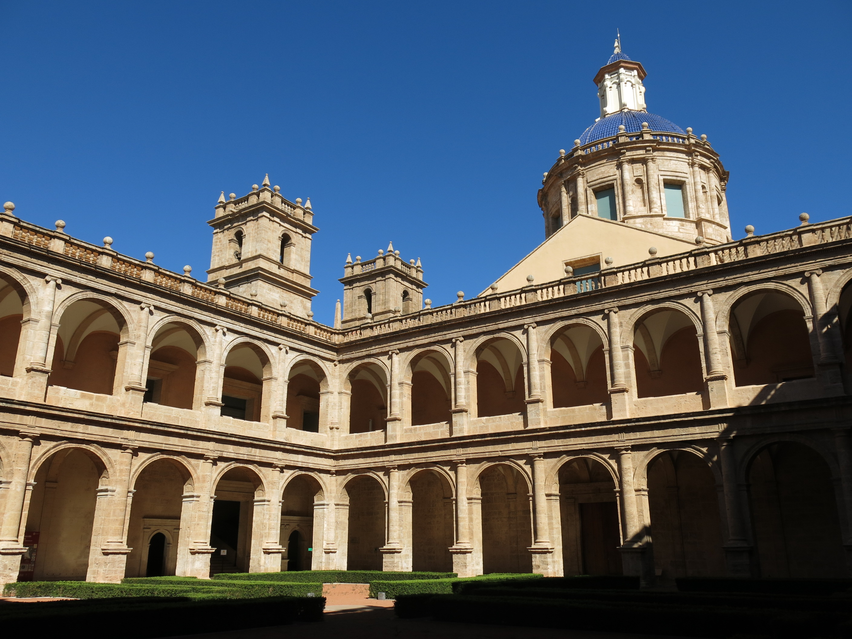 Sant Miquel dels Reis (València), claustre sud, angle nord-oest, torres i cúpula de l'església